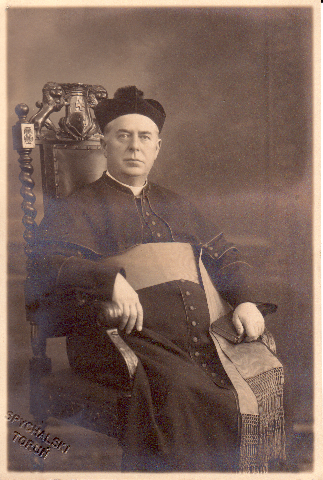 Ksiądz infułat Józef Szydzik